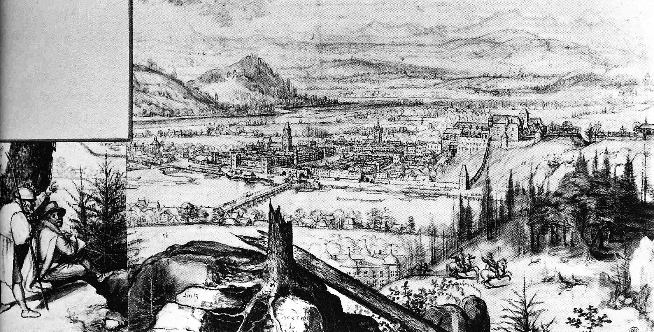 Ansicht von Linz mit Freistz Egereck